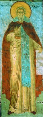 Прп. Даниил Переславский. Роспись Троицкого собора Данилова мон-ря в Переславле-Залесском. 1668 г. Артель Гурия Никитина